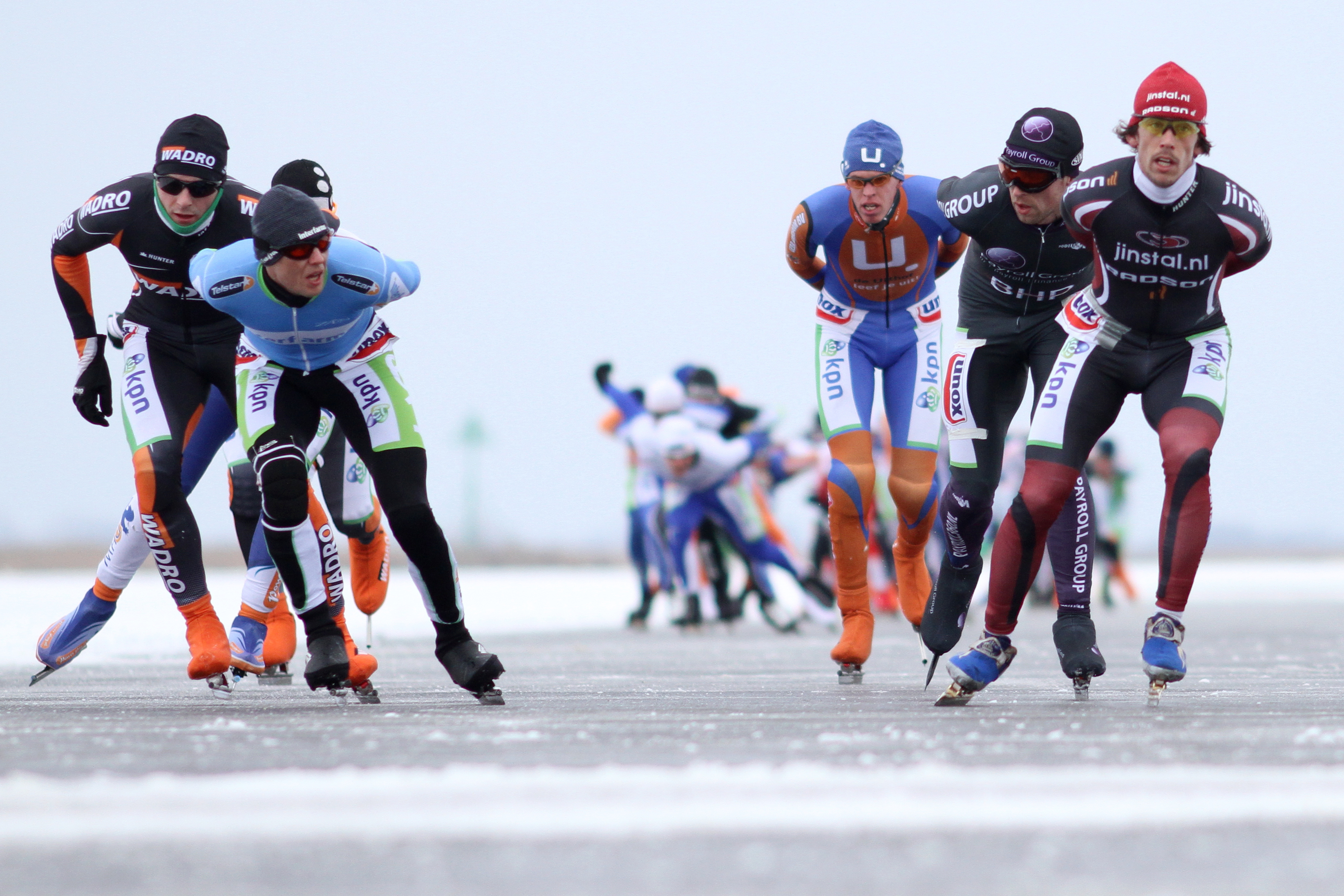 De Ronde van Skarsterlân is een natuurijsklassieker die wordt verreden in de Friese gemeente Skarsterlân, op het ijs van de Goingarijpster Poelen. De wedstrijd telt vanaf 2012 mee voor het klassement van natuurijsklassiekers.